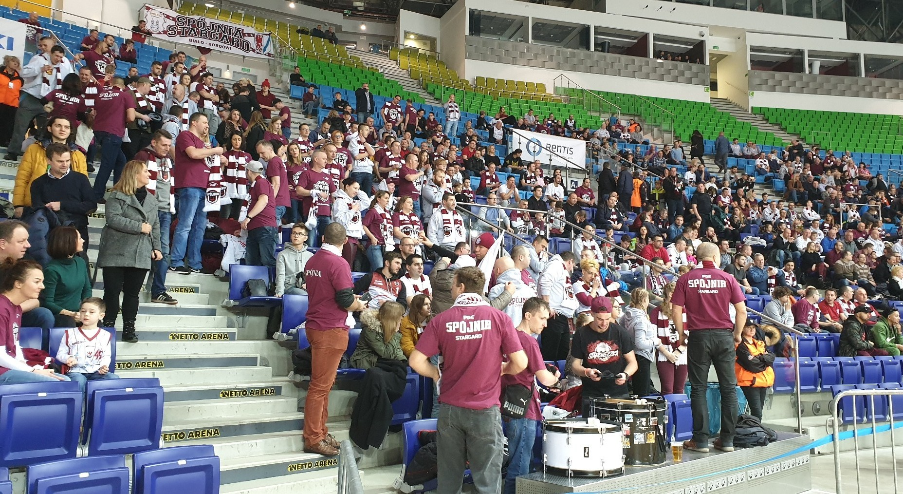 Szczecin, 01.01.2020. King Szczecin - PGE Spójnia Stargard